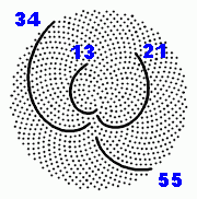 Blütenstand mit 1000 Samen angeordnet im Goldenen Winkel mit Fibonacci-Spiralen. Erstellt von Wolfgang Beyer.